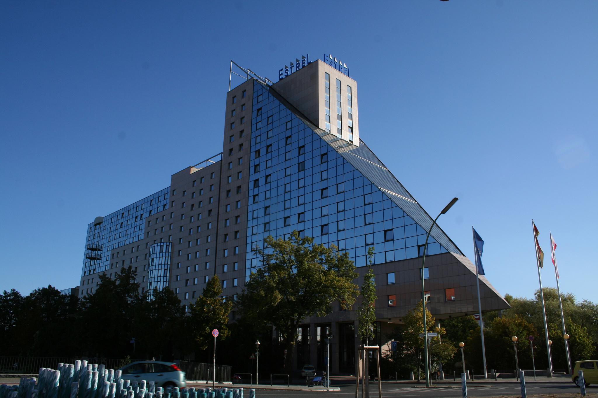 Das Gebäude des Hotel Estrel von der Sonnenallee aus betrachtet.